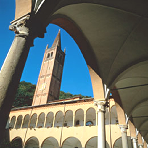 Campanile Madonna della salute (anno 1428) Monteortone, Abano Terme (Padova)..